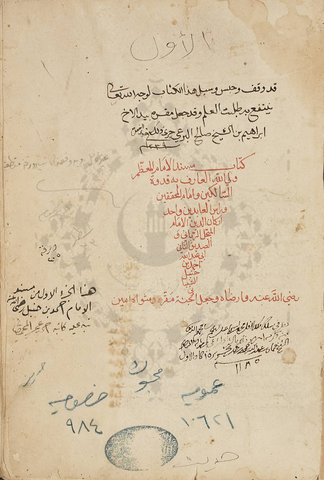 الصفحة الأخيرة لمخطوطة لمسند الإمام أحمد تعود إلى 1185 هـ/1772م